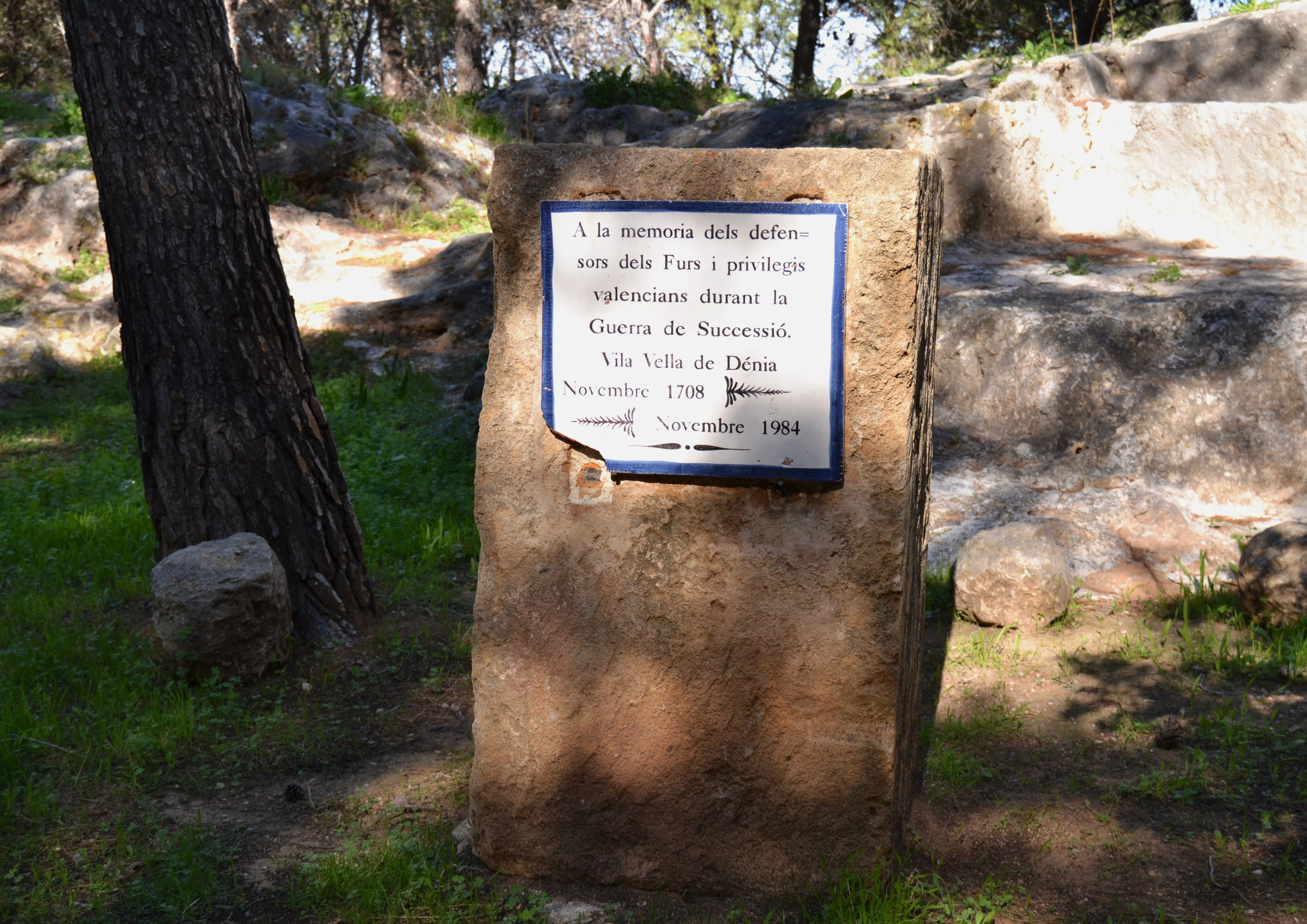 Monument als defensors dels Furs i privilegis valencians durant la Guerra de Successió, castell de Dénia.